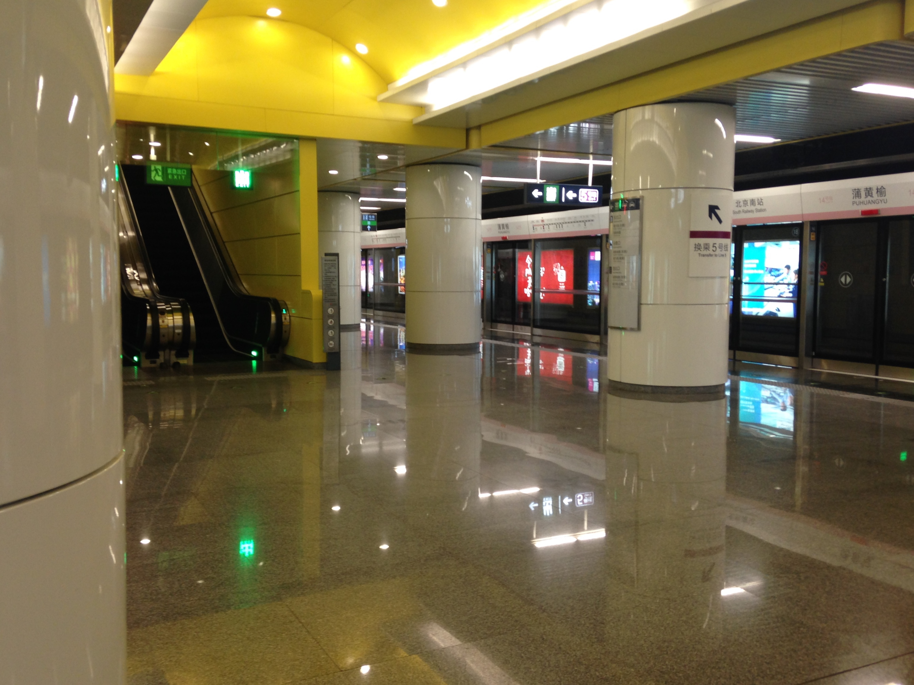 蒲黄楡駅(北京地下鉄14号線)のホーム